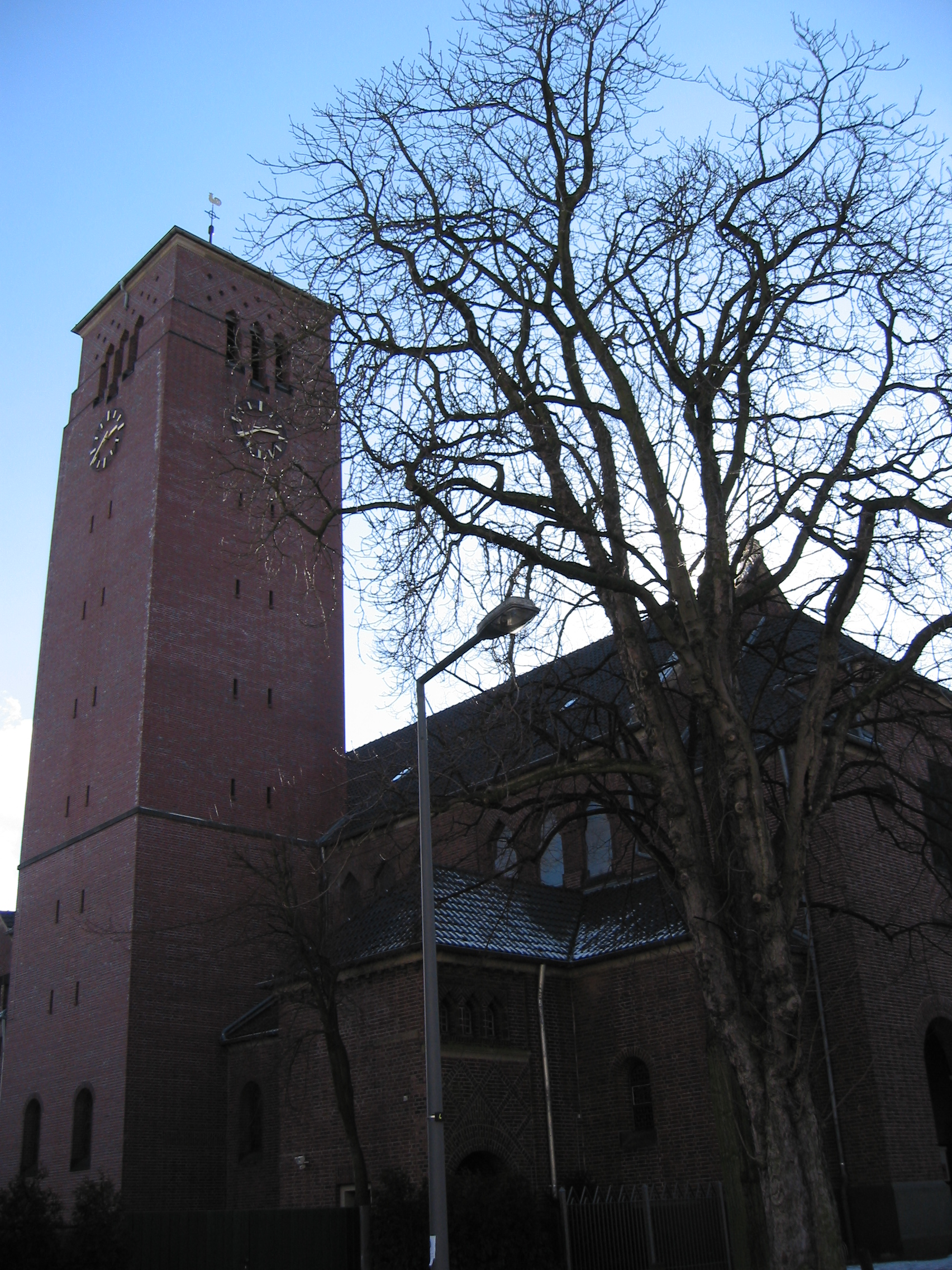 Köln-Holweide Mariä Himmelfahrt